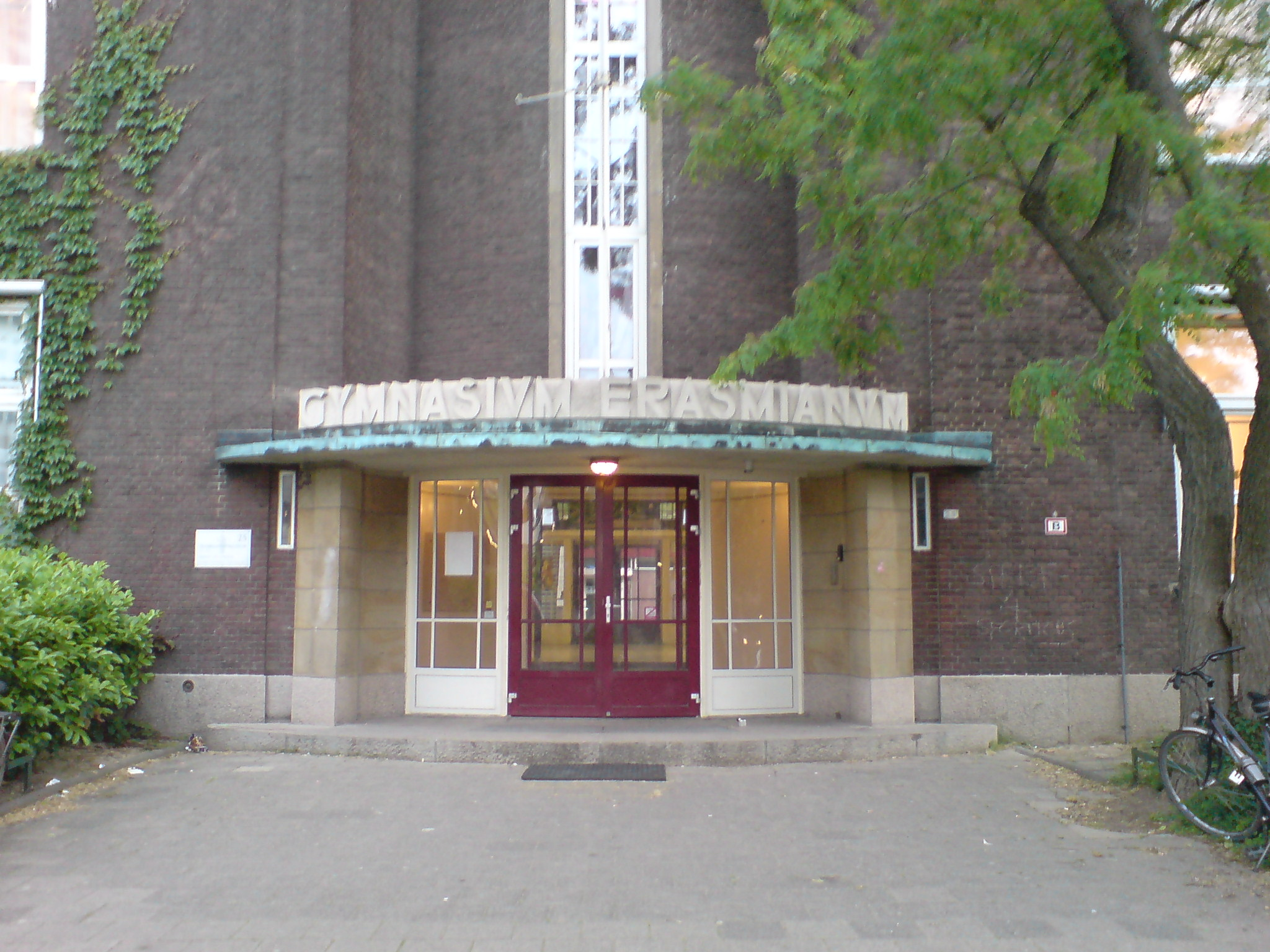 Entrance Gymnasium Erasmianum